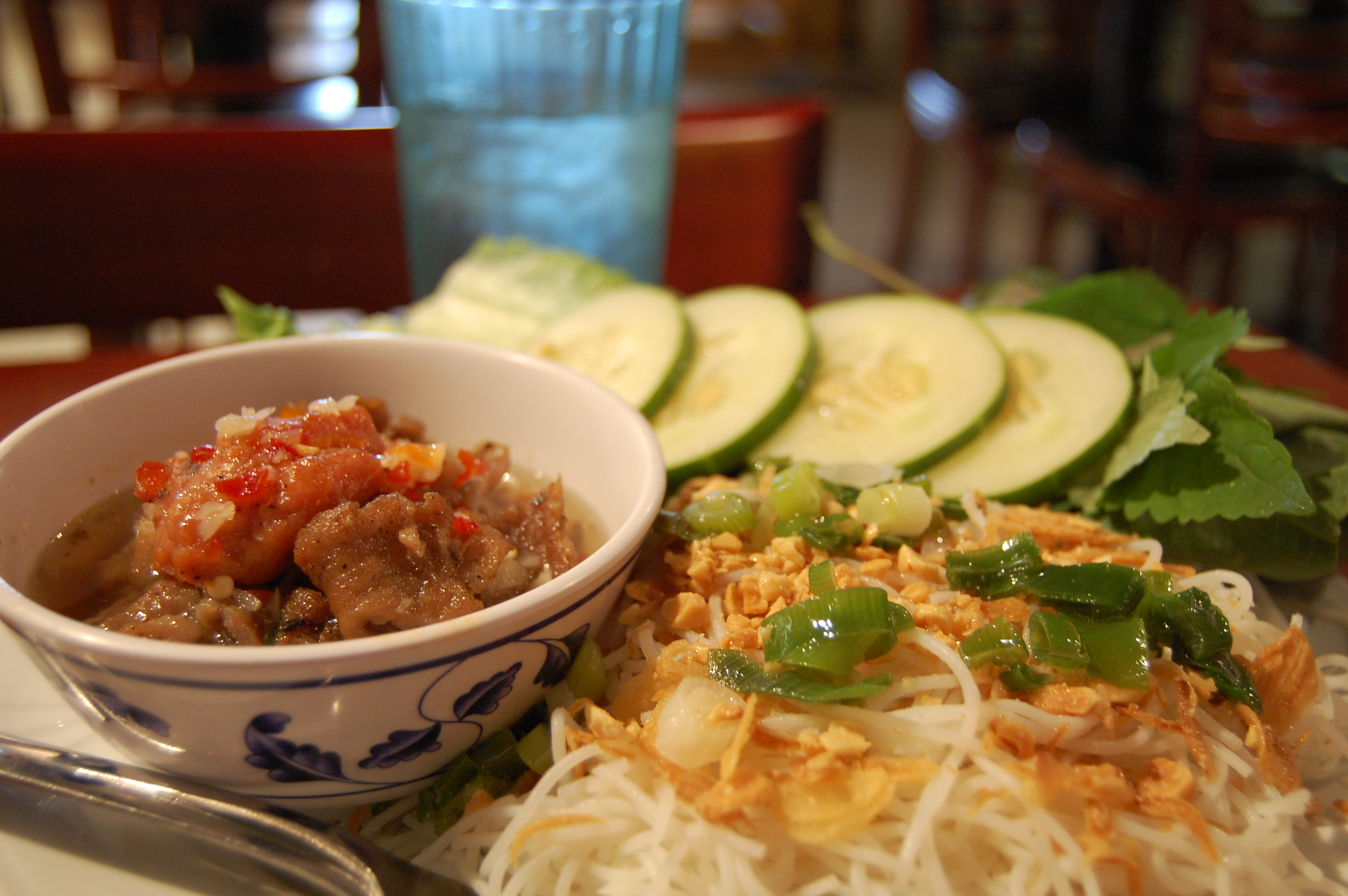 bun cha hanoi Vietnamese Bún chả food